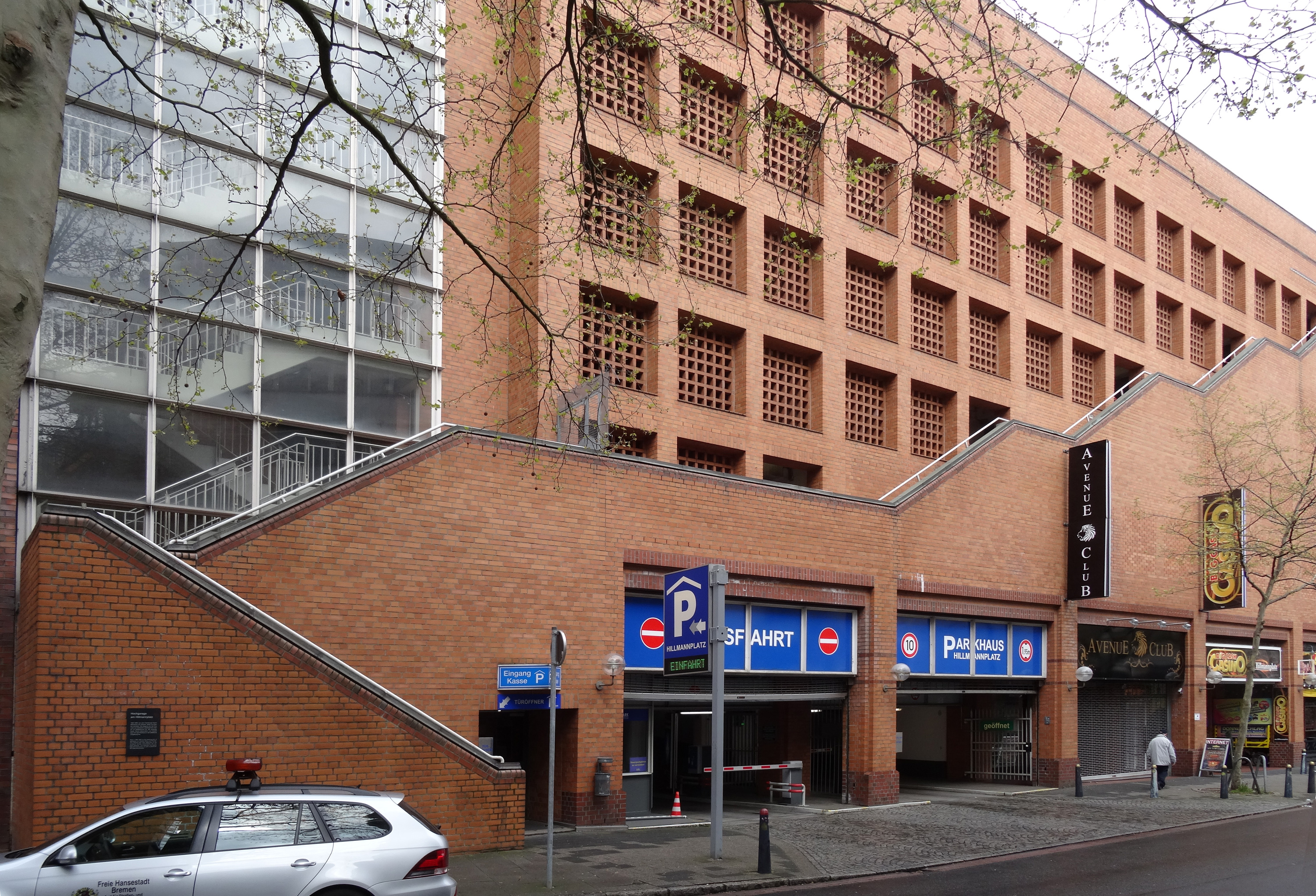 Parkhaus Hillmannplatz in Bremen - Mitte, am Hillmannplatz. Das Gebäude gehört zu den bedeutenden Bremer Bauwerken. Es entstand 1984 nach Plänen der Architekten Meinhard von Gerkan und Volkwin Marg